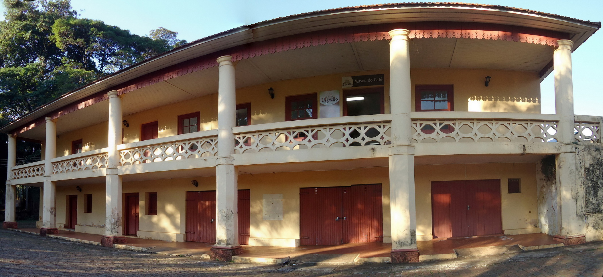 Museu do café. Fazenda Lageado Unesp Botucatu. Faculdade de Agricultura.